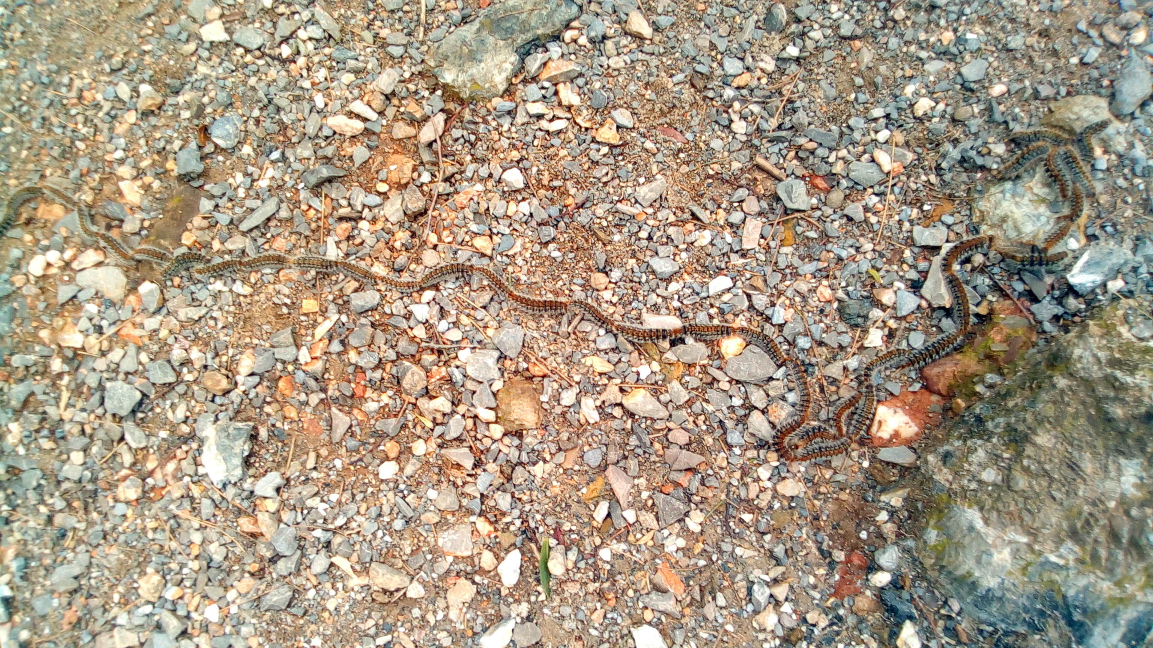 Procesionaria, Park Güell, Barcelona.